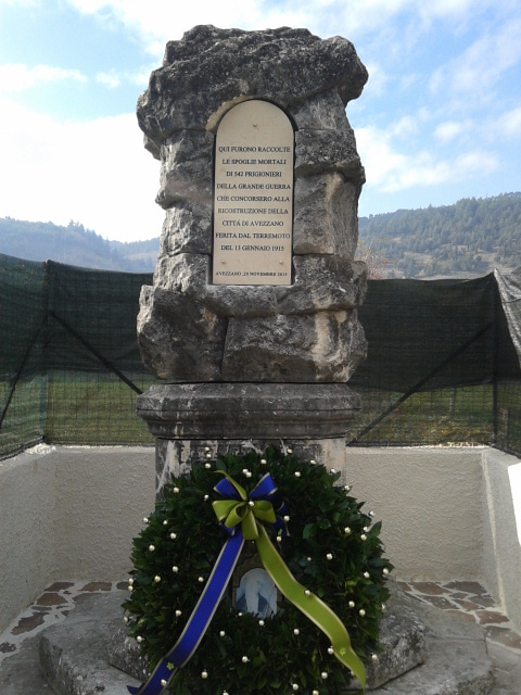 Monumento all'ex cimitero dei prigionieri austro ungarici